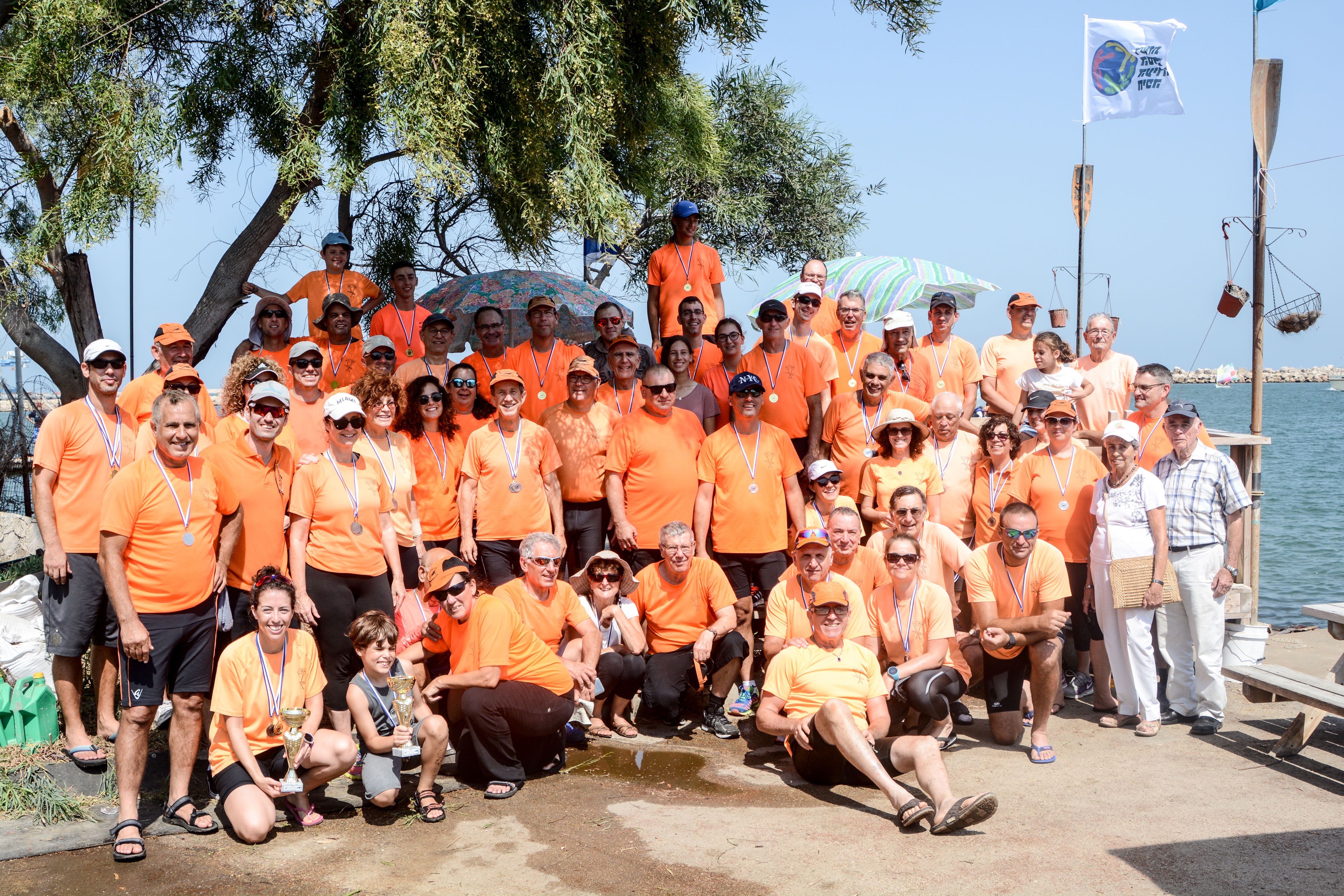 Haifa Rowing Club members